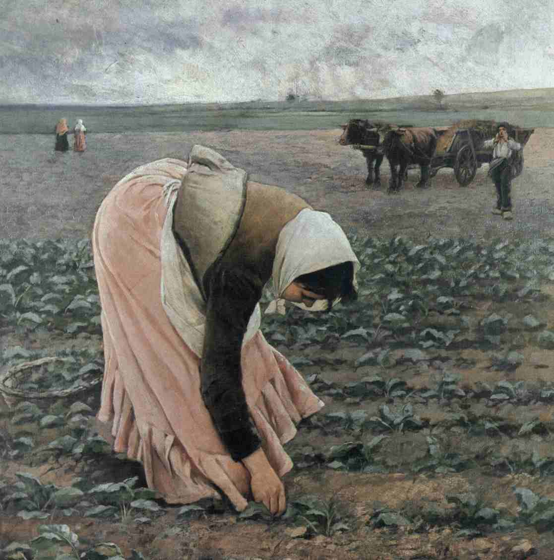 Plečka